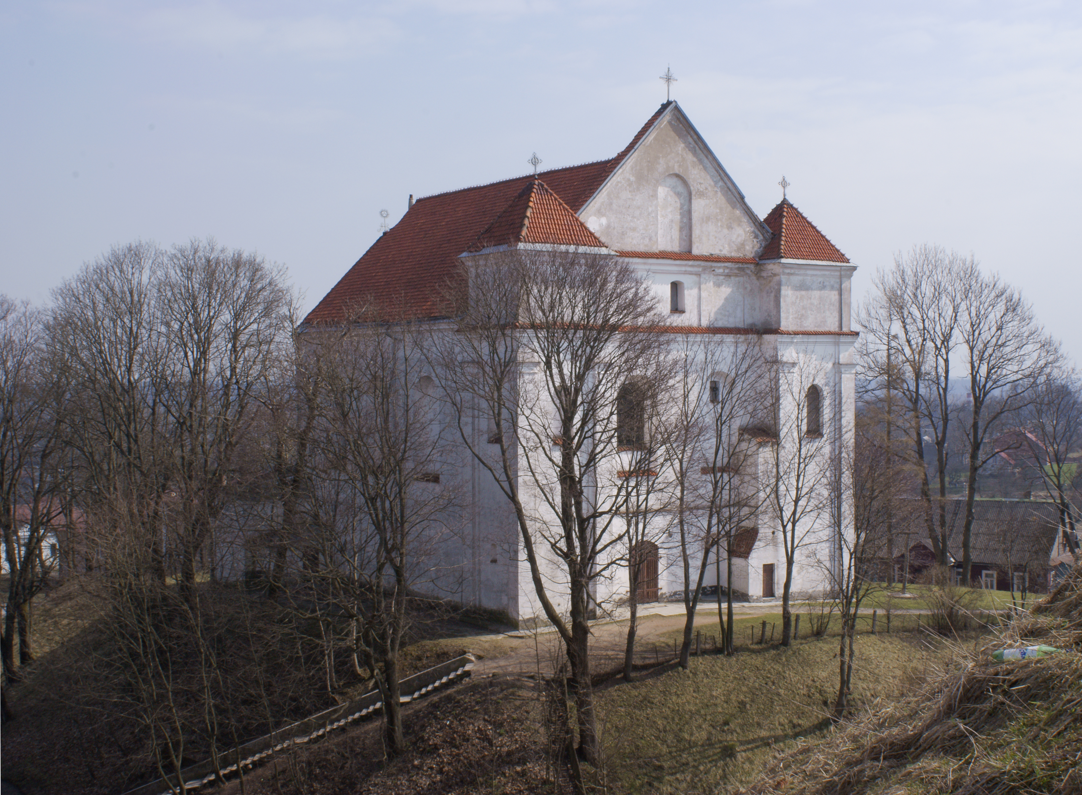 Фарный костёл Преображения Господня в г. Новогрудок This is a photo of Belarusian heritage monument. Reference number: 411Г000403 ( WLM)